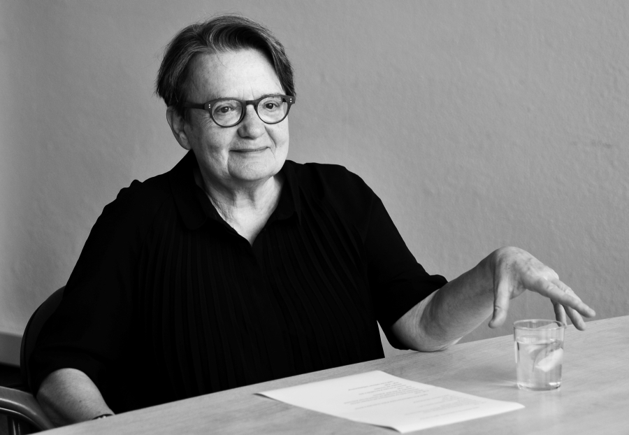 Portret Agnieszki Holland